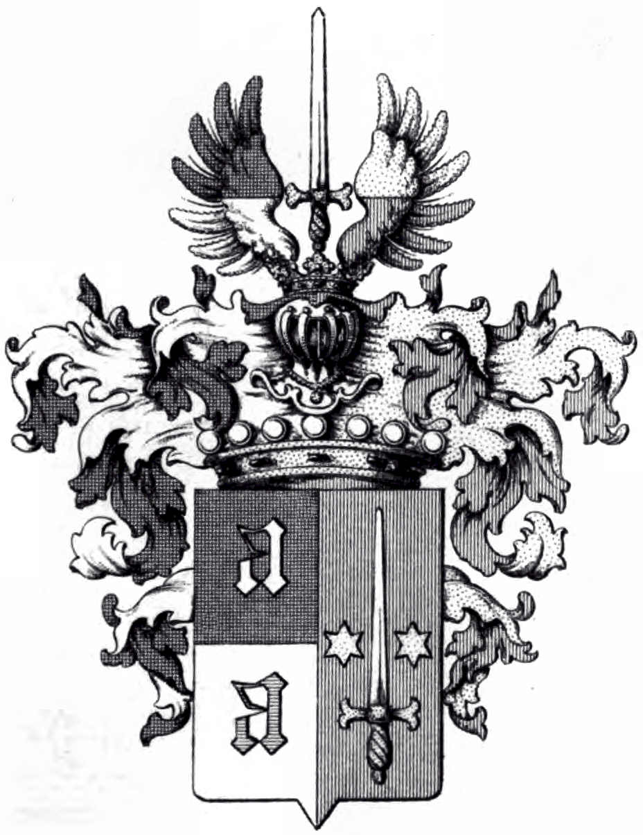 Wappen der Freiherrn von Catty 1862, TY 33, T. 50